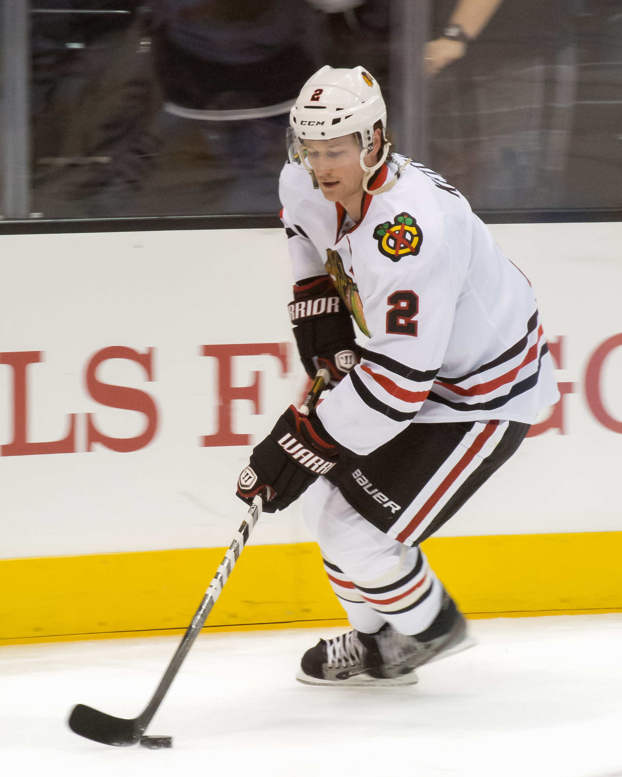 Duncan Keith